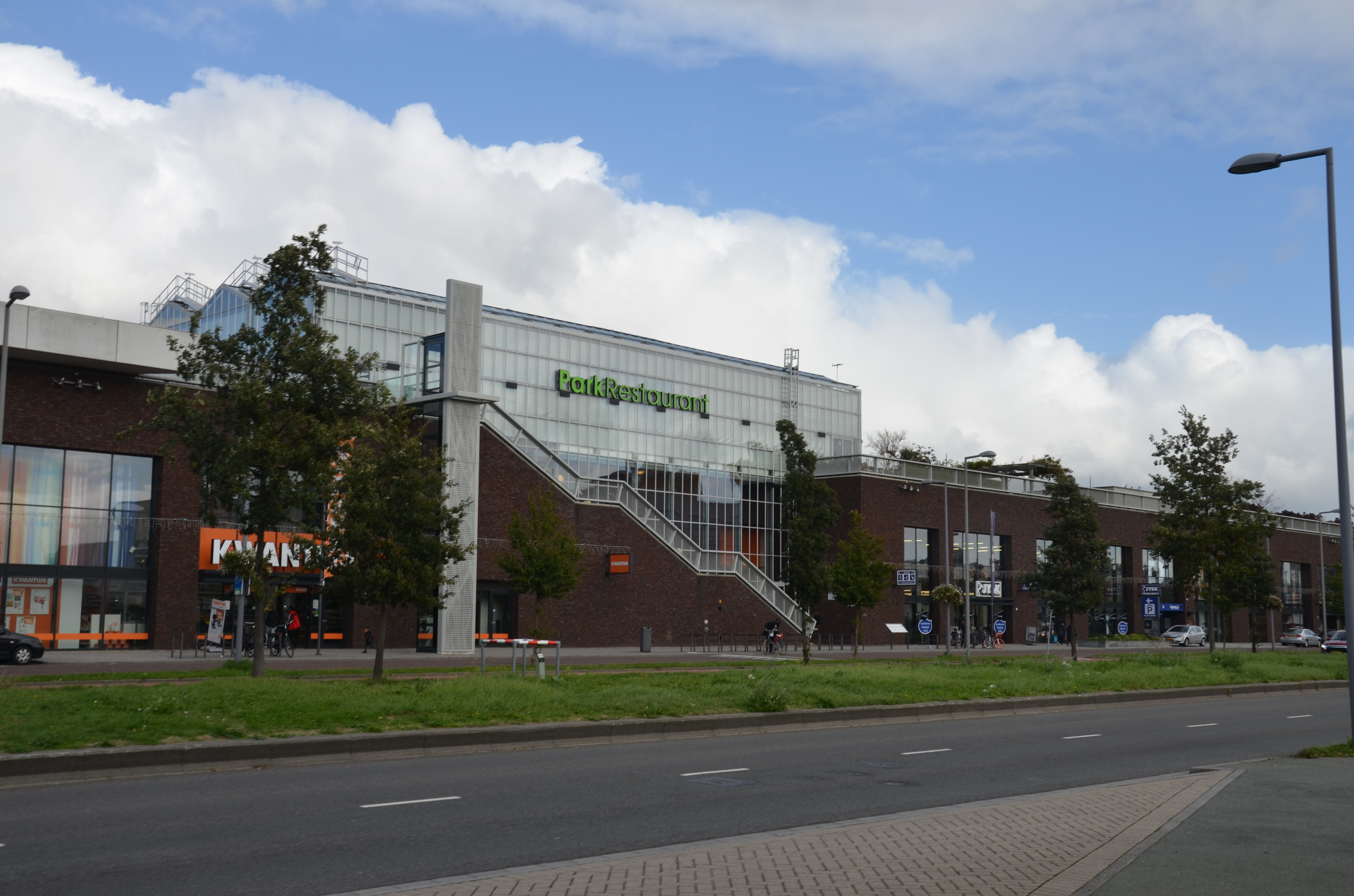 Het Parkrestaurant in winkelcentrum Bigshops Parkboulevard in Rotterdam.